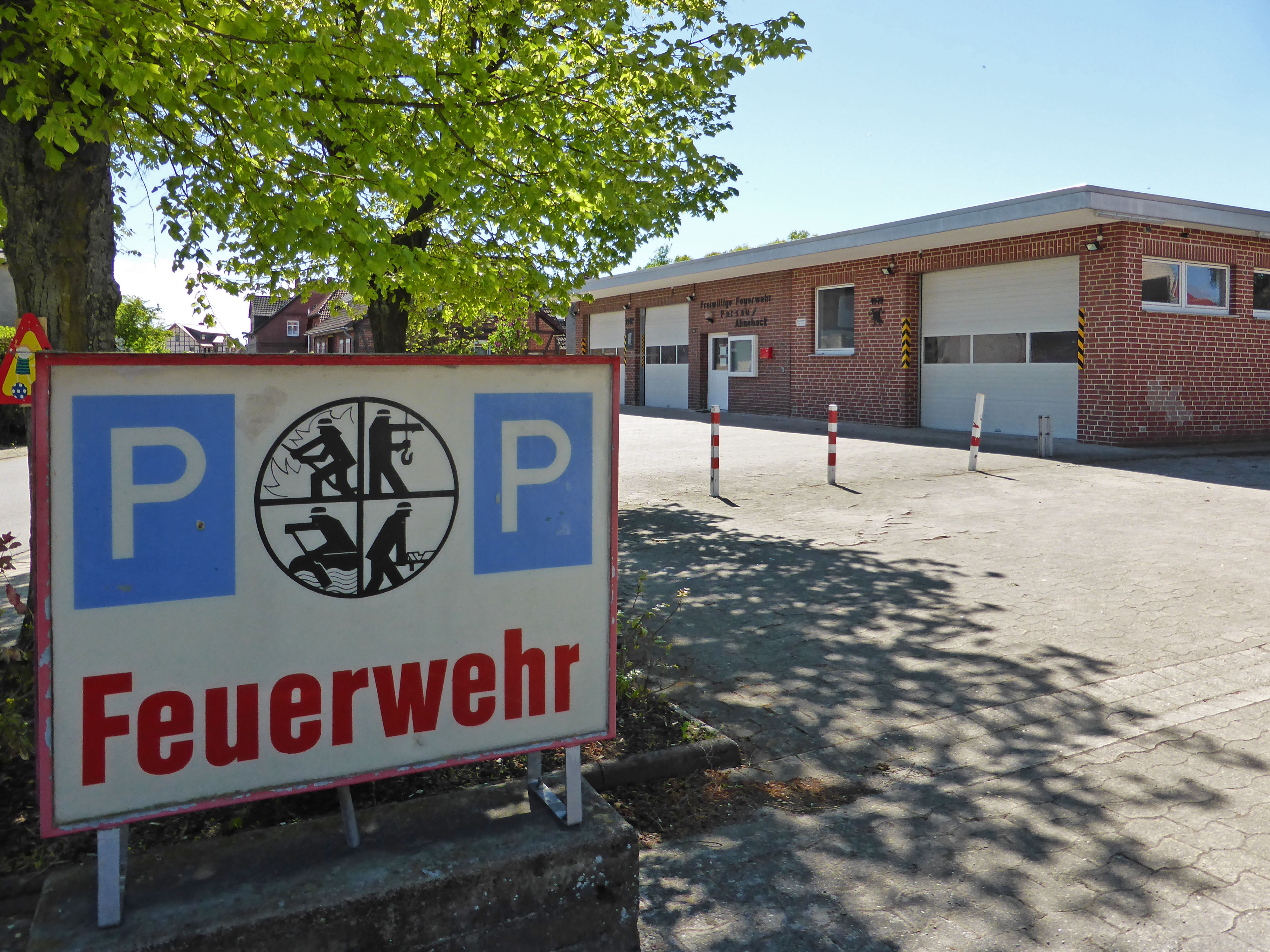 Feuerwehrhaus in Parsau.